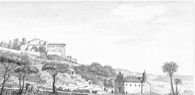 Il santuario in una stampa del 1818